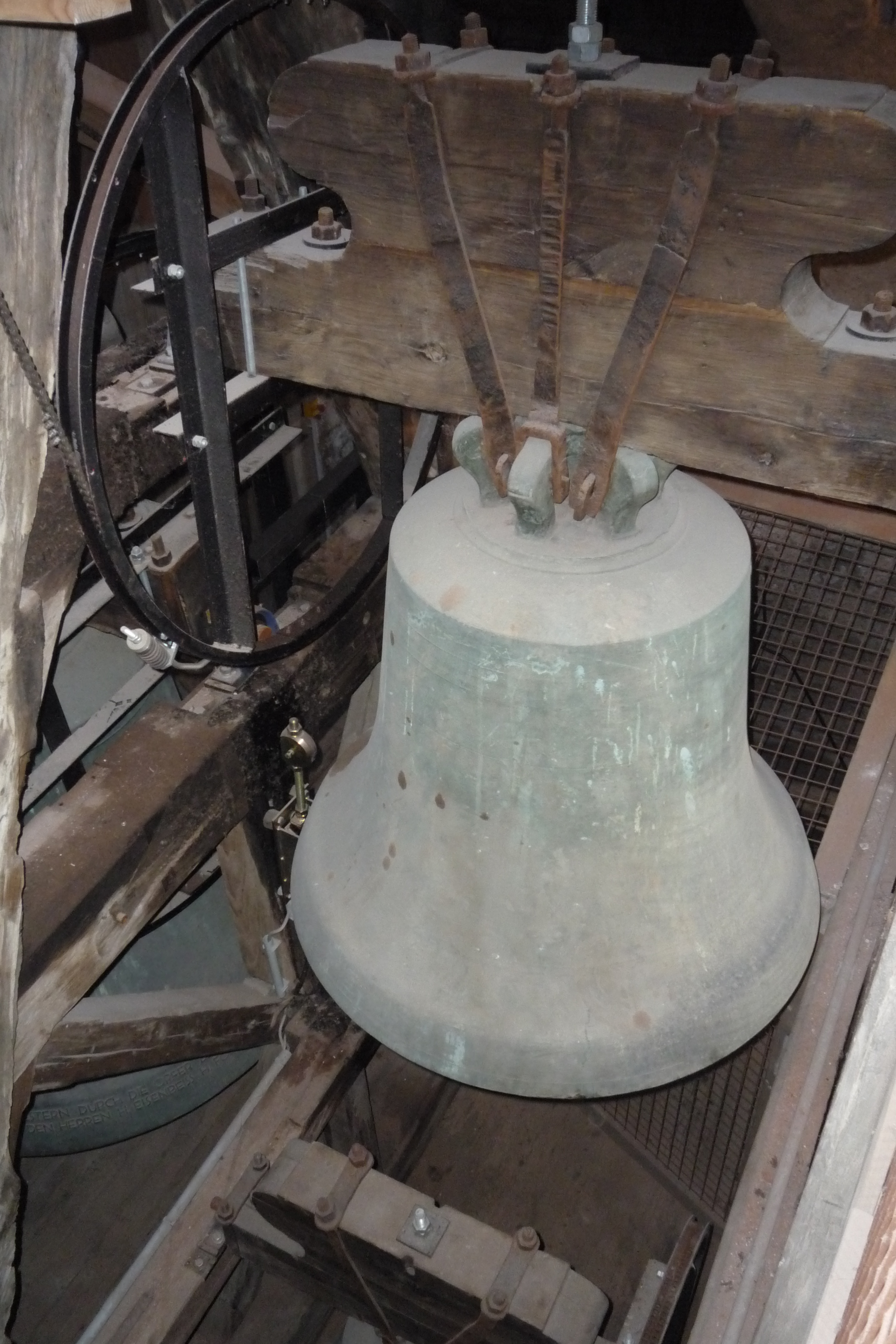 Glocke Immakulata im Stadtturm Enns